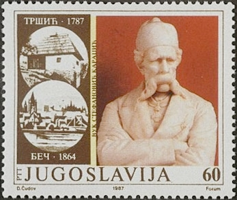 Vuk Karadžić